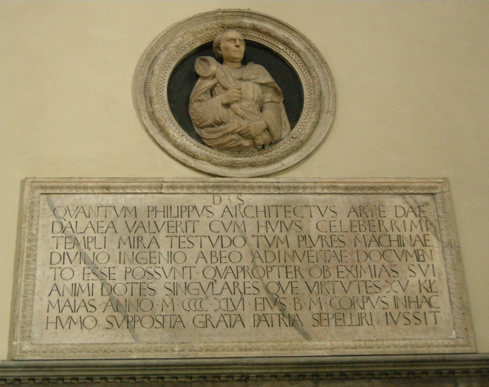 Smf, busto e epigrafe filipo brunelleschi (il buggiano)